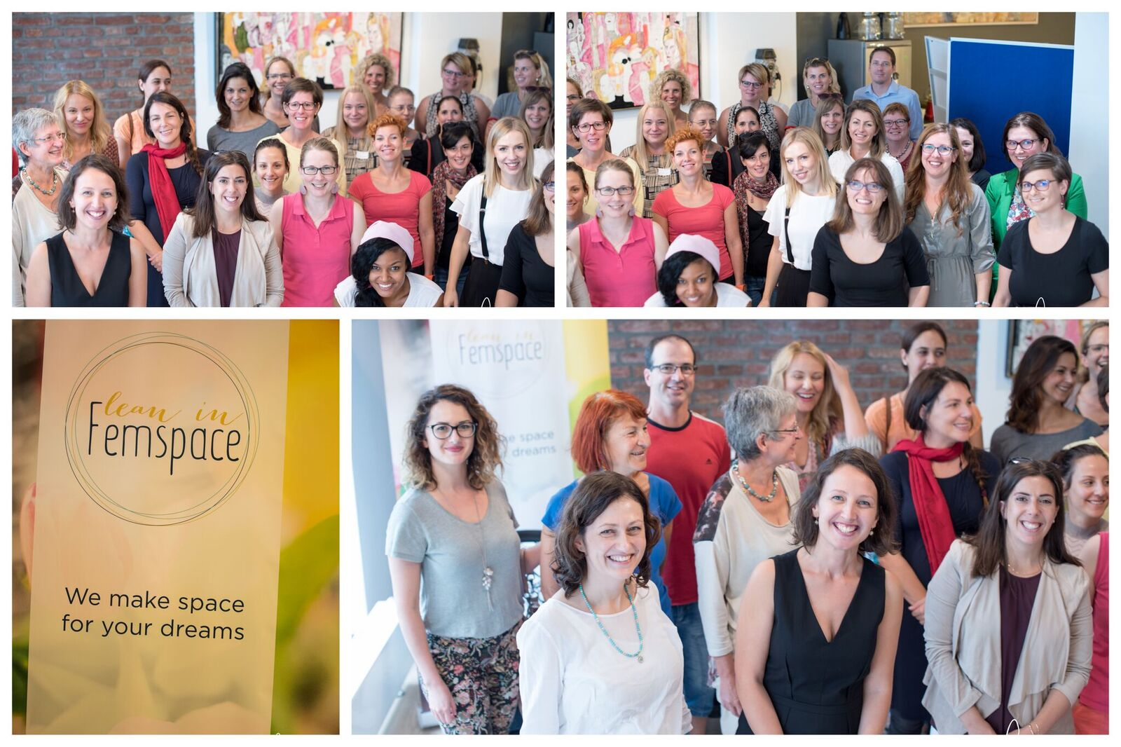 Femspace rendezvény